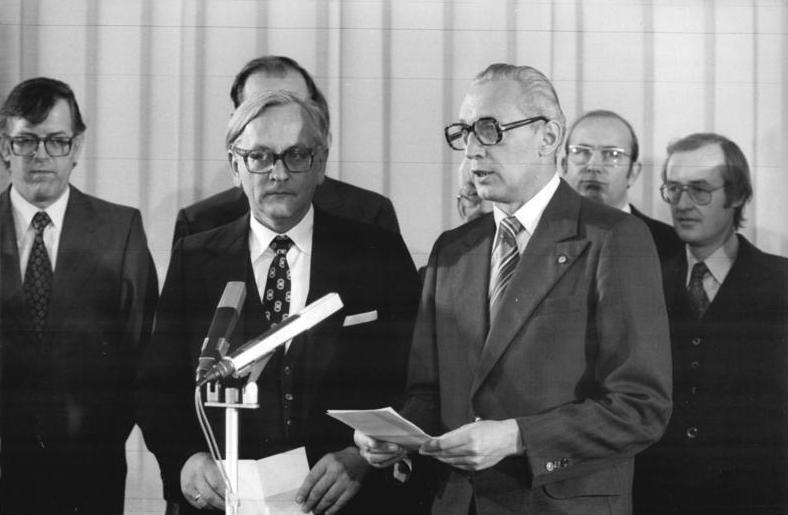 ADN-ZB Franke 16.11.1978 Berlin: Abkommen mit BRD unterzeichnet Auf der Grundlage von Vorschlägen der DDR wurden am 16.11. im Ministerium für Auswärtige Angelegenheiten der DDR in Berlin eine Reihe wichtiger Regelungen und Vereinbarungen zu Verkehrs- und anderen Fragen mit der Regierung der BRD unterzeichnet. Nach der Unterzeichnung gab der Stellvertreter des Ministers für Auswärtige Angelegenheiten der DDR, Kurt Nier (r.), eine Erklärung ab. Links der Leiter der Ständigen Vertretung der BRD in der DDR, Günter Gaus.